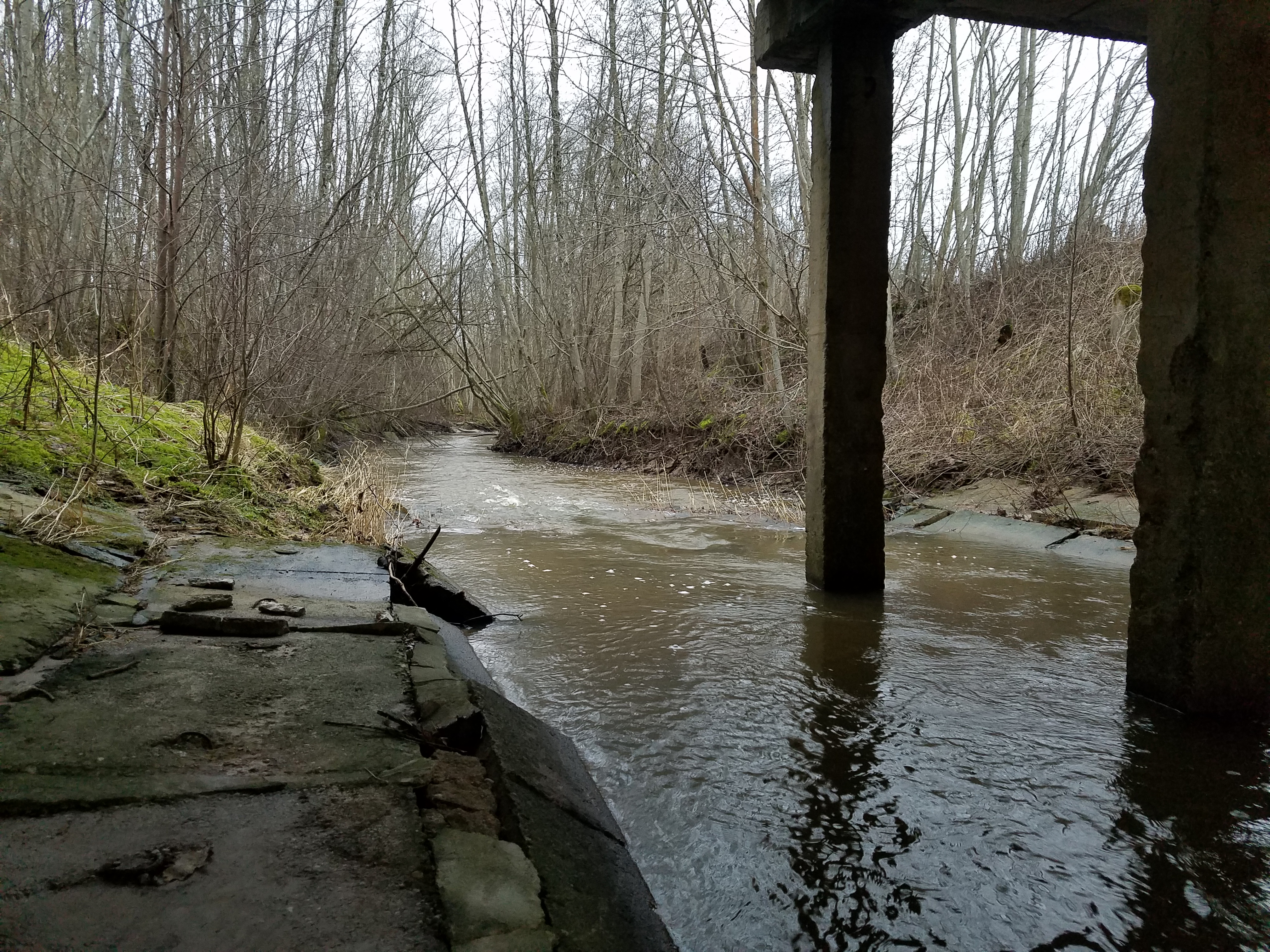 Karkluojė prie Kupšių